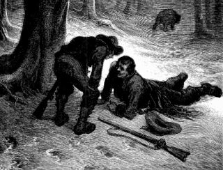 source: dessin de gustave doré L'ours et les deux compagnons tiré de l'édition de 1868 des Fable de La Fontaine Licence: GPL et GFDL Modifié par Rinaldum 10 jan 2004 à 00:16 (CET) Livre téléchargable sur gallica, le site de la BNF